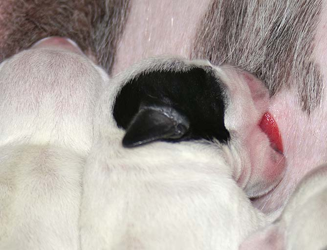 Dalmatinerwelpe mit Kopf-Ohrenplatte